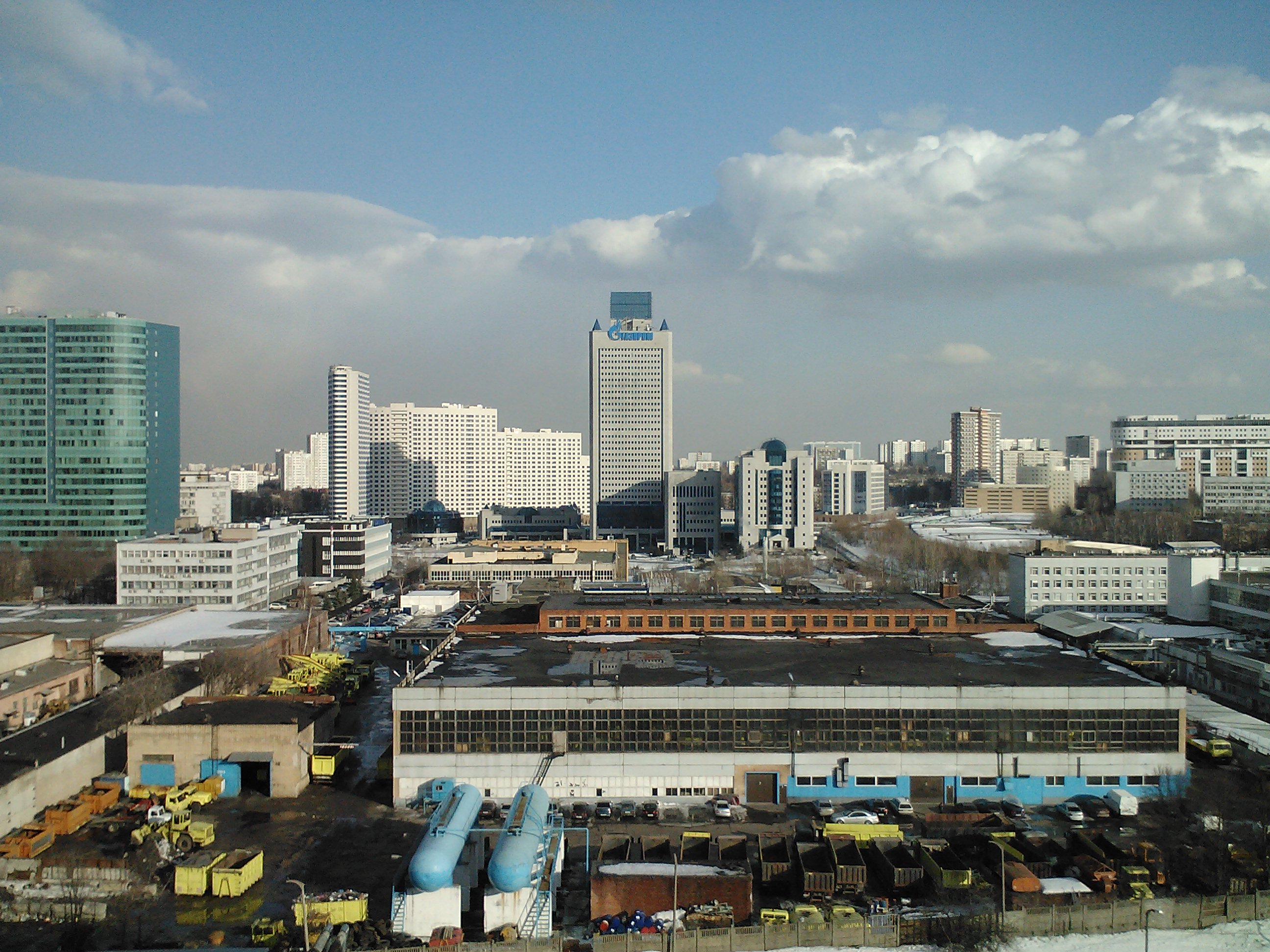 Москва. Электродепо московского метрополитена Калужское. Вид сверху.